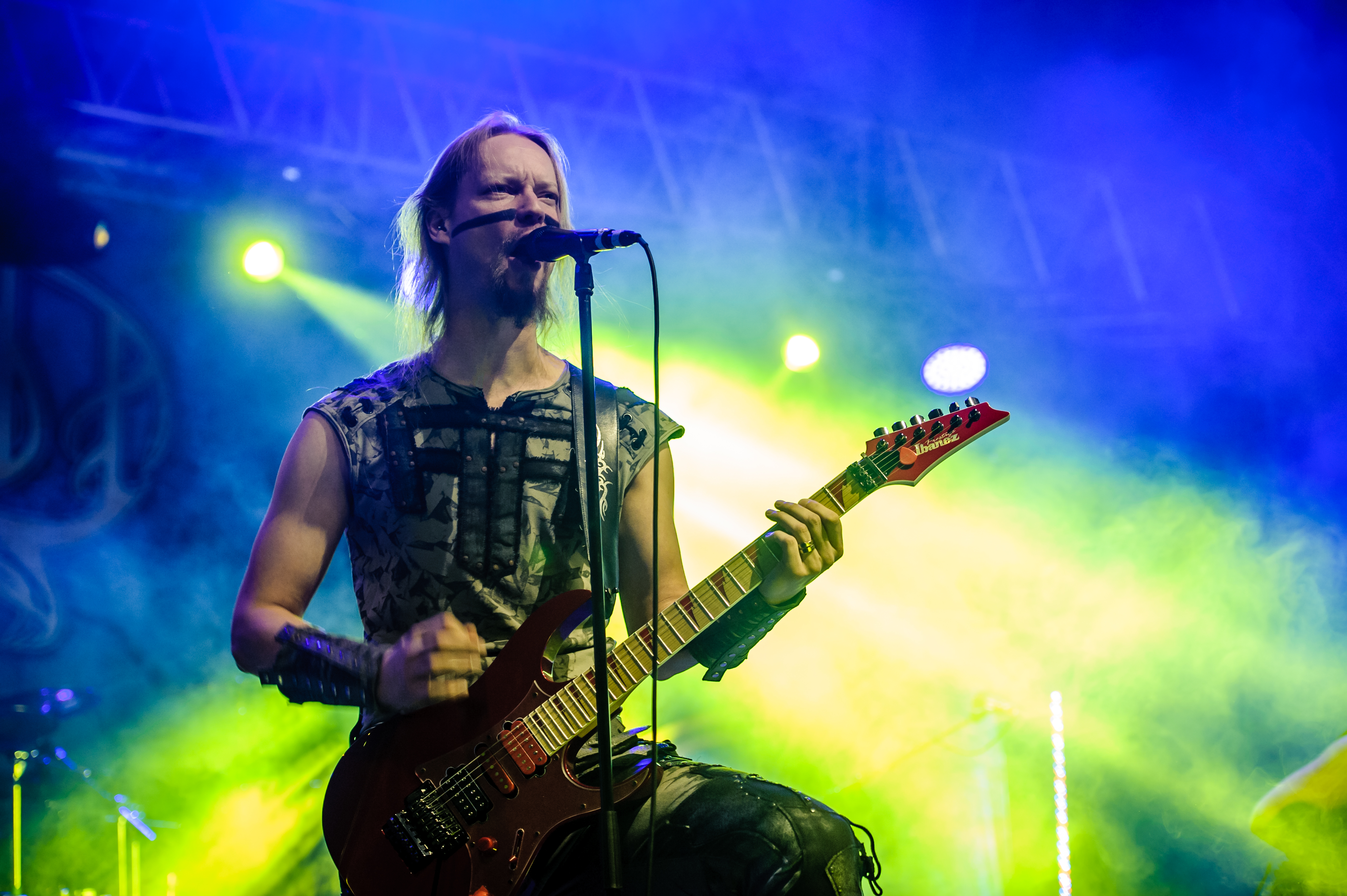 'Ruhrpott Metal Meeting 2016; Oberhausen Turbinenhalle': 'Ensiferum'